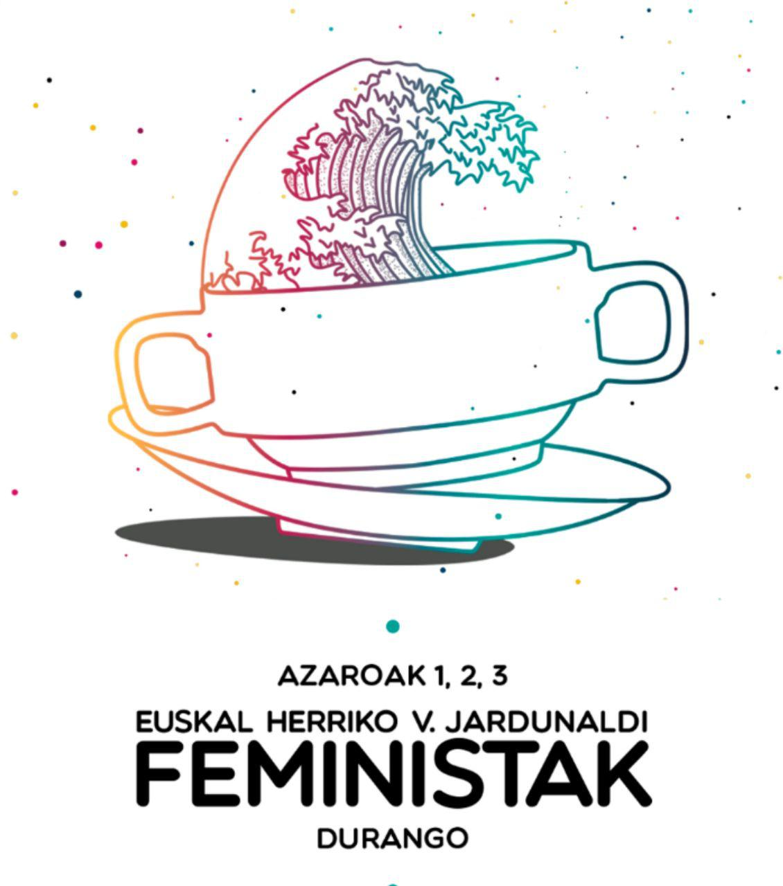 2019an Durangon (Bizkaian) Euskal Herriko V. Jardunaldi feministen kartela.